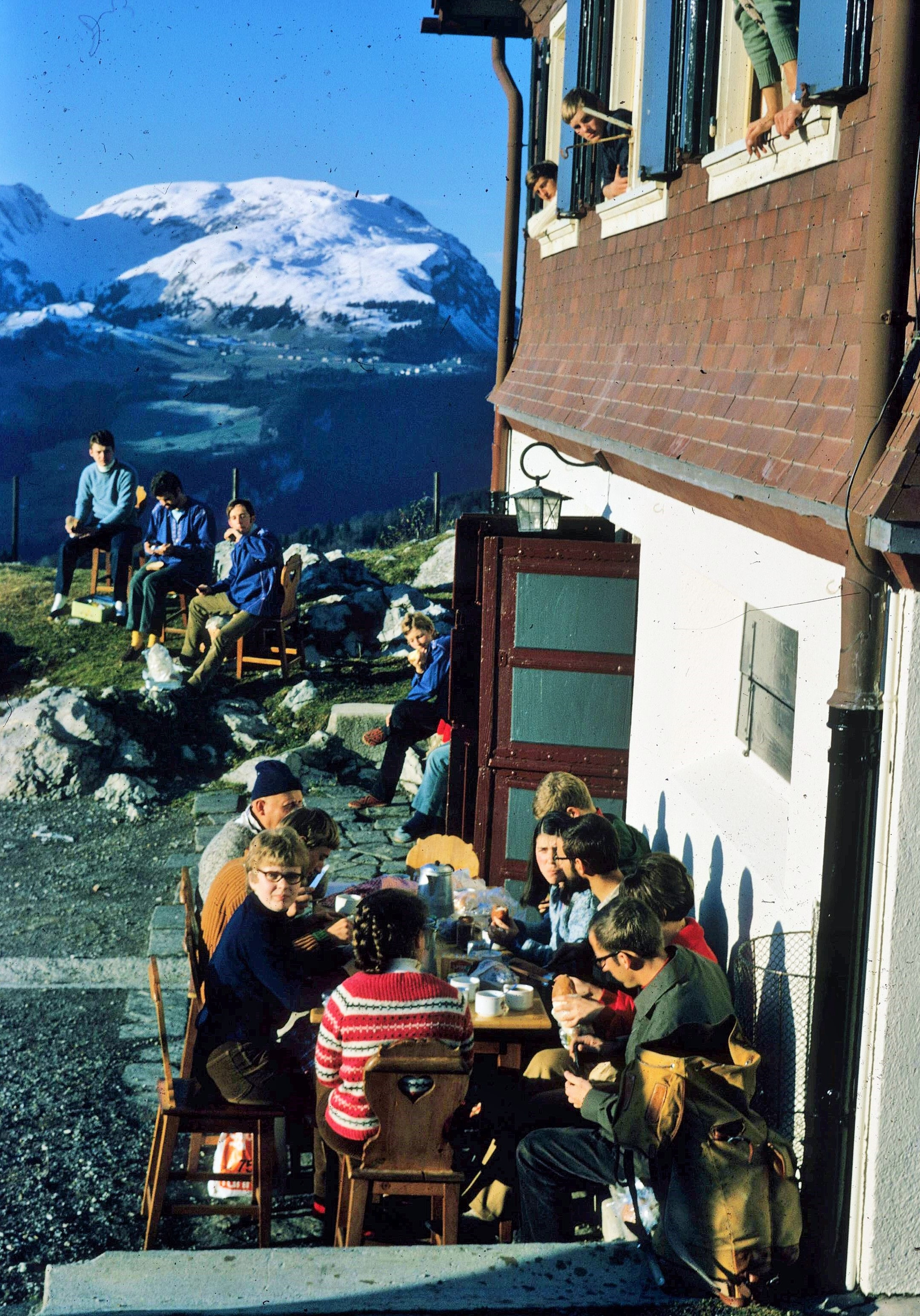 Clubhaus Eseltritt Ibergeregg SZ, Schweiz: JO "Hausräuke" nach Umbau